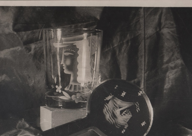 Petit miroir à main avec un vase, tous les deux gravés, de Pierre Lardin.